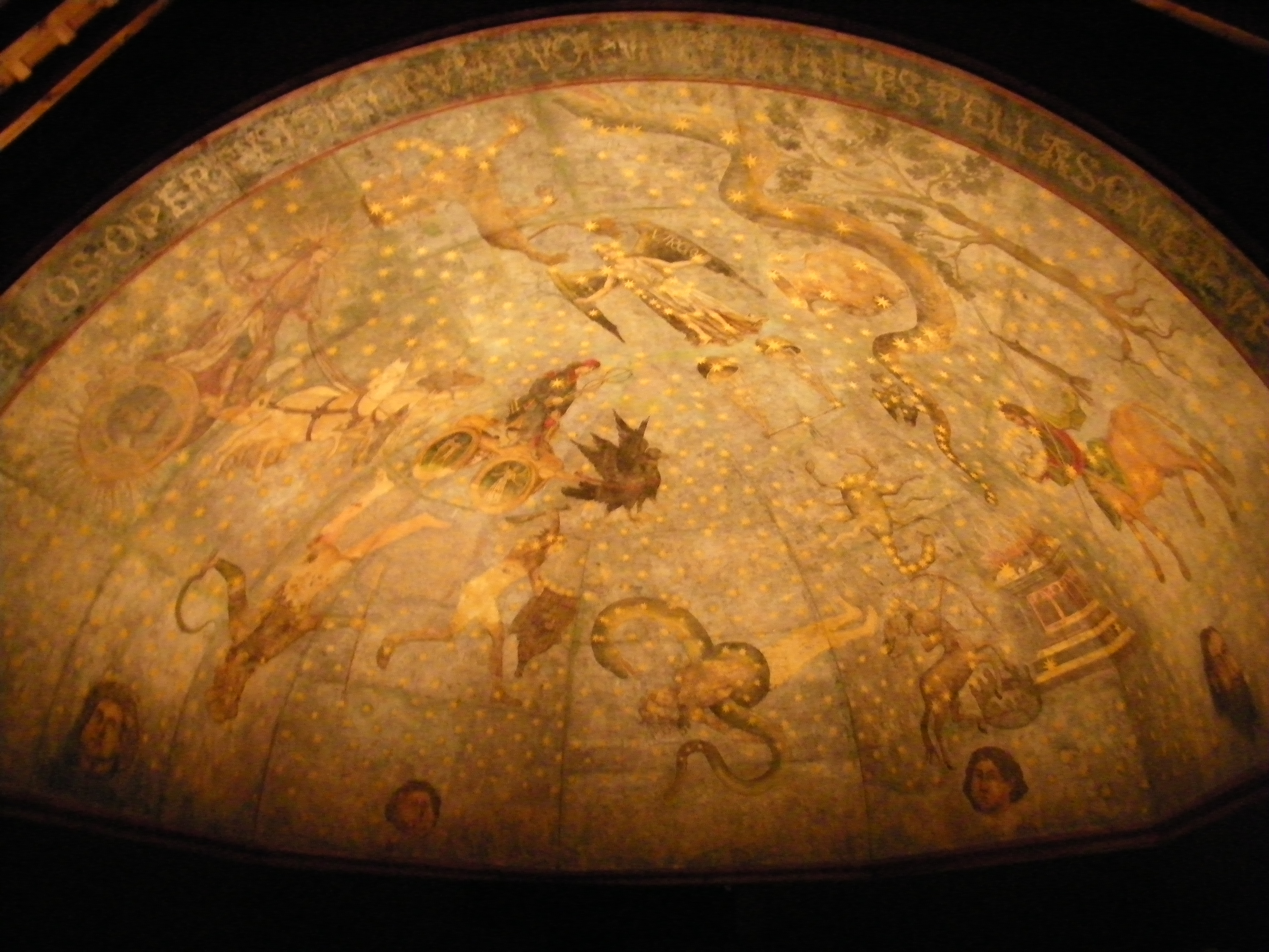 Cielo de Salamanca. Antigua pintura de la bóveda de la Biblioteca de la Universidad de Salamanca.